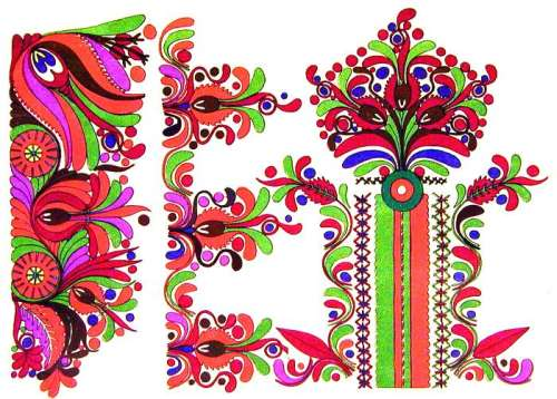 Könyvborító Győrffy István: Matyó szűrhímzések. A szűrszabó ipar remekei tizenhat színes táblán. Egyetemi Nyomda, Budapest, 1928.